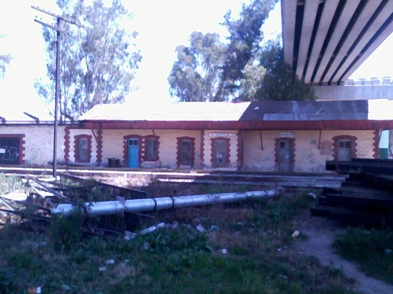 Antigua estación de cuautitlan ubicada al noroeste de el centro, utilizada antes para la linea B que corria de mexico a veracruz.